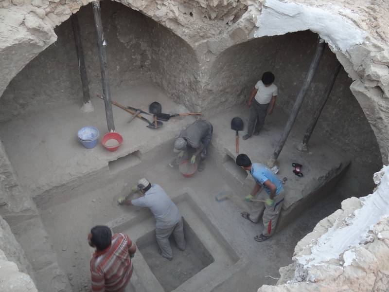 Category:منطقة كوخرد Category:كوخرد تصنيف:محافظة هرمزكان